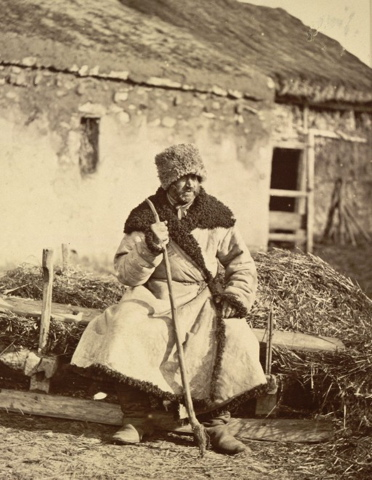 Чоловік в кожусі. Київщина[1] (Можливо Бессарабія[2])